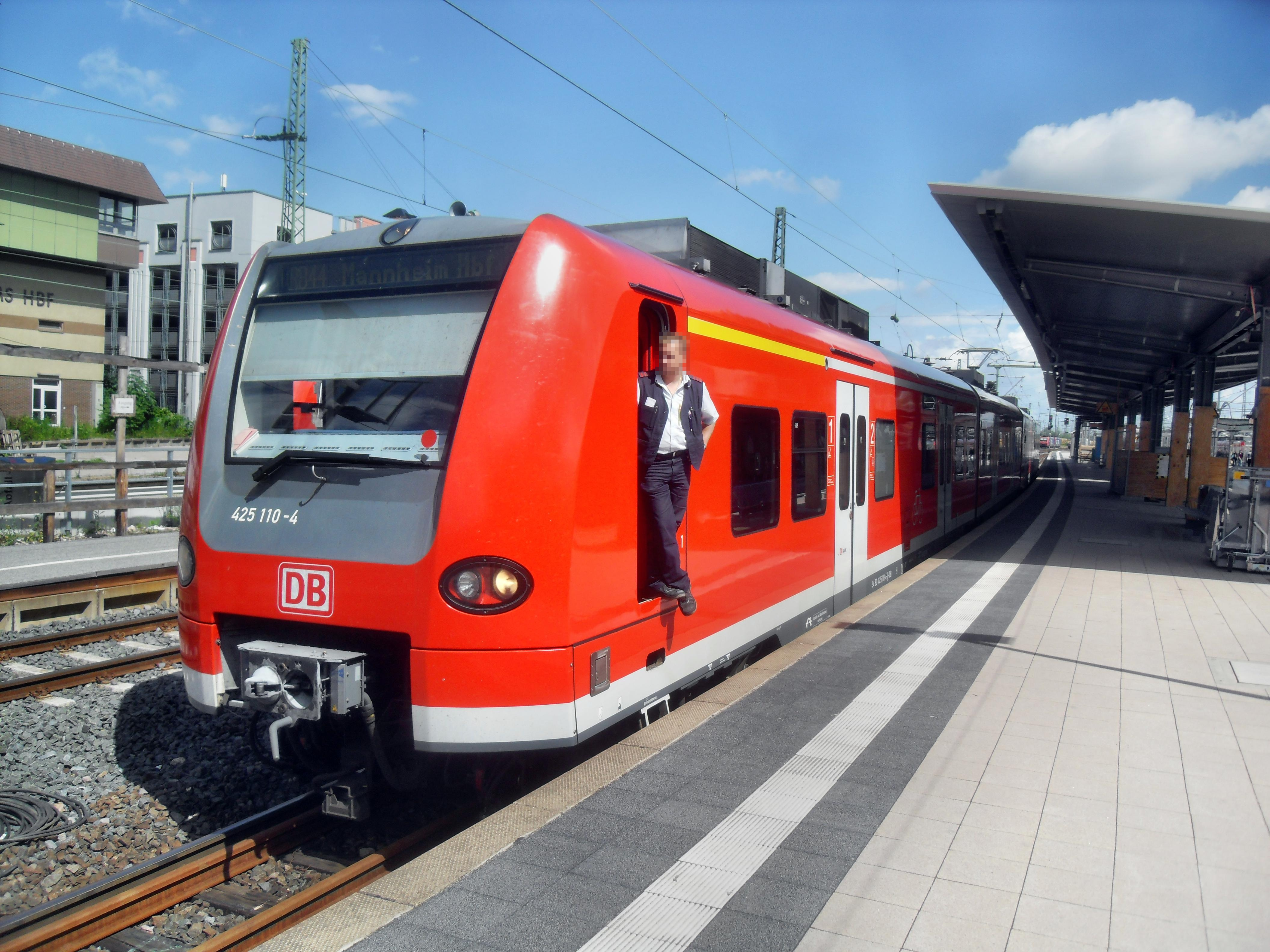 RegionalBahn 44 der DBAG-Baureihe 425 im Wormser Hauptbahnhof auf dem Weg nach Mannheim